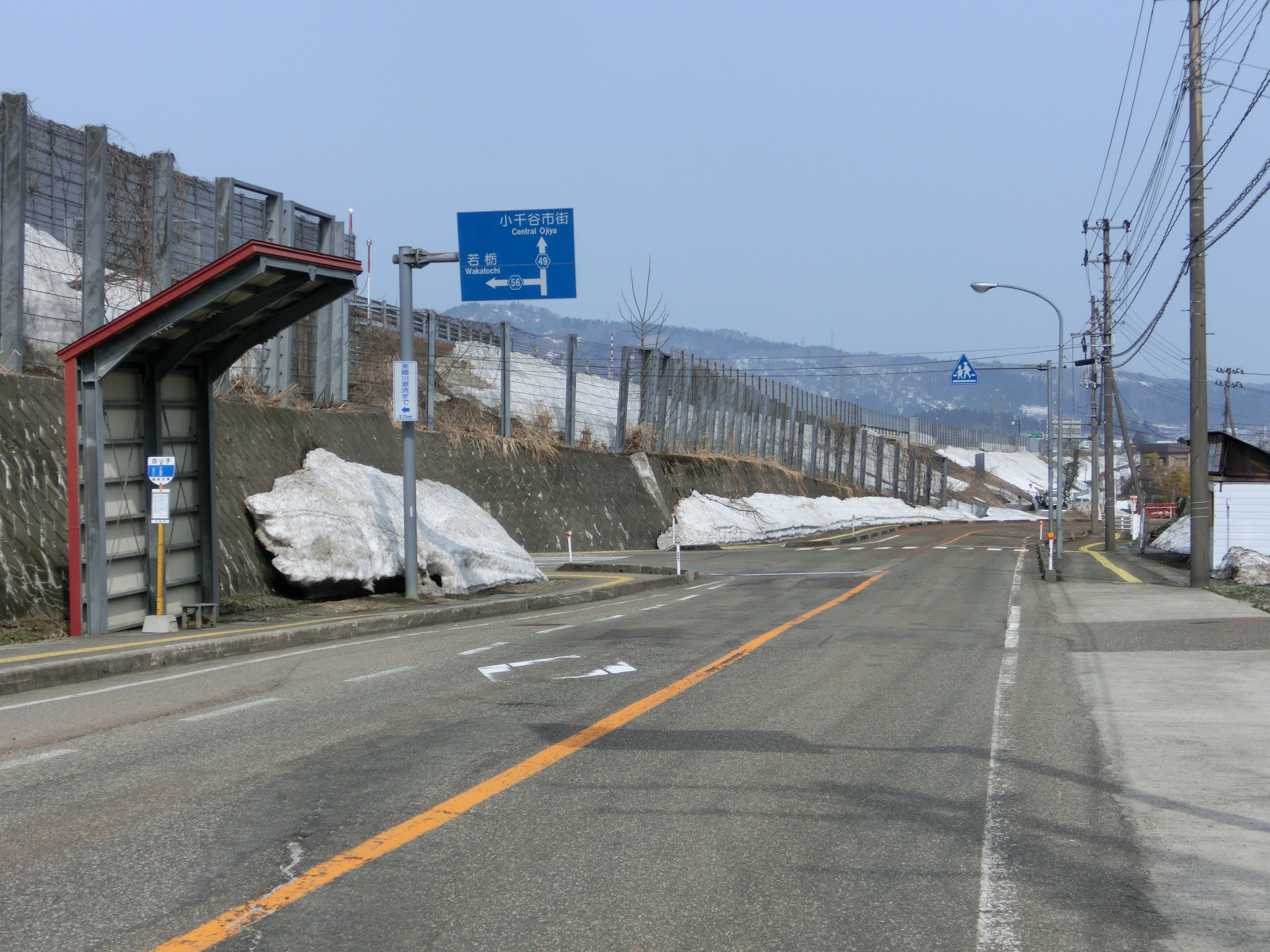 この画像は2018年3月29日投稿者によって、小千谷市大字四ツ子字沢口(新潟県道49号小千谷十日町津南線上)上にて撮影された新潟県道56号小千谷大沢線始点の写真。写真左側に写っている屋根付の待ち相場は越後交通四ツ子バス停留所。新潟県道49号と並行している盛土とフェンスは関越自動車道の上り車線側。 Casio Exilim EX-ZR200